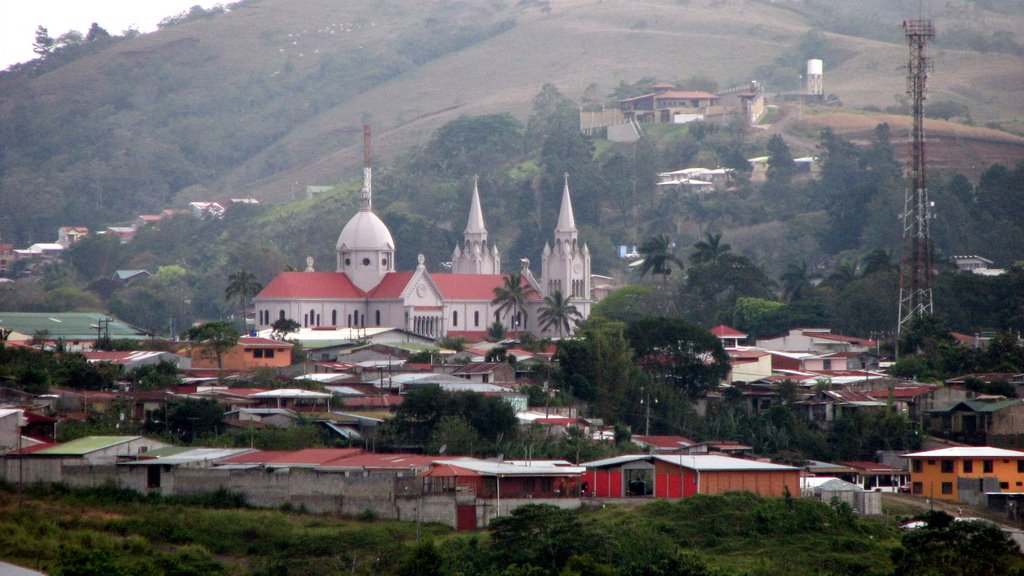 Vista panorámica de la ciudad con el templo parroquial en primer plano.